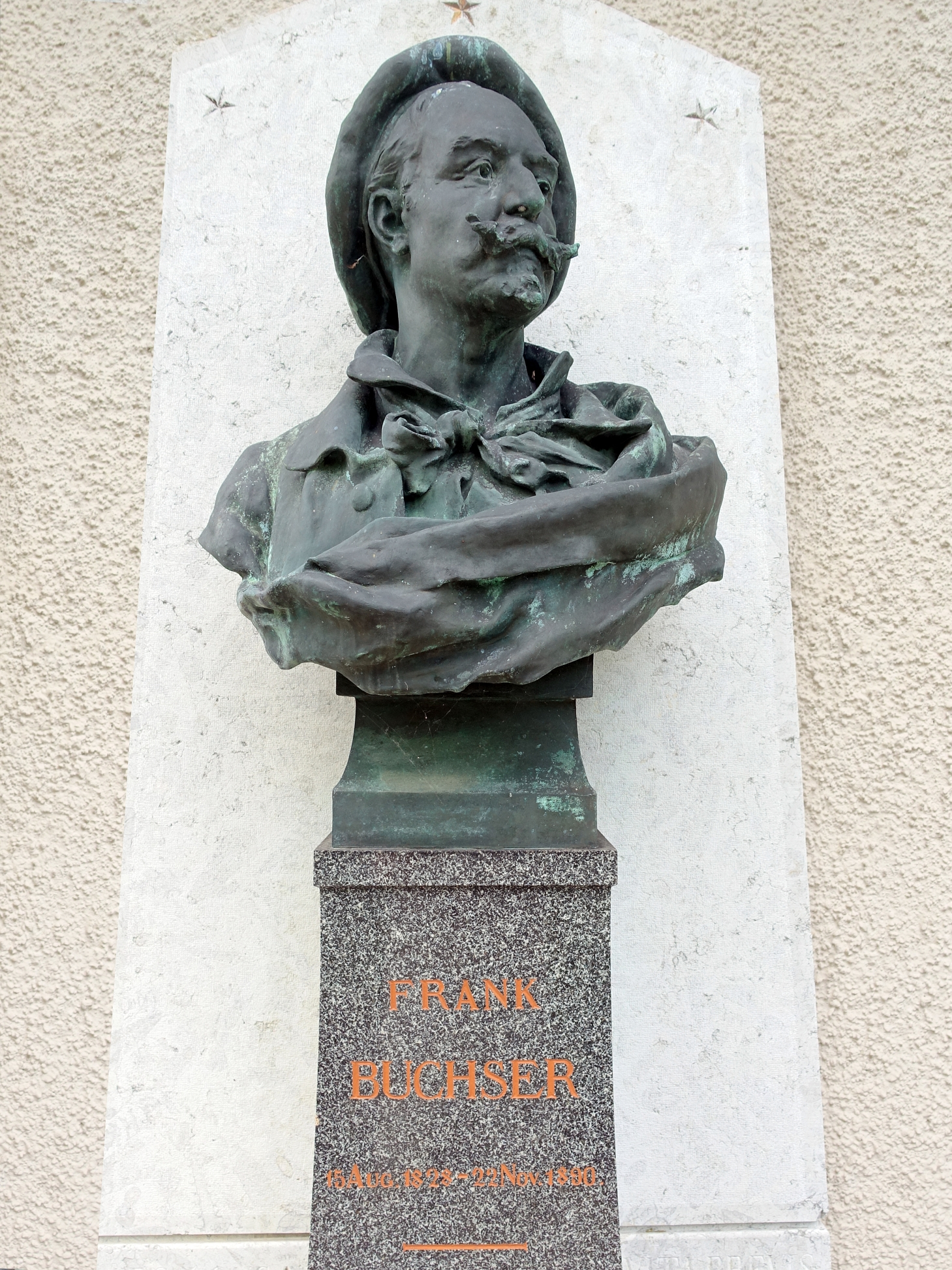 Frank Buchser (1828–1890) Maler, Abenteurer. Grab. Kirche St. Niklaus, Friedhof Feldbrunnen-St. Niklaus, Solothurn. Büste von Max Leu (1862–1899) Bildhauer.